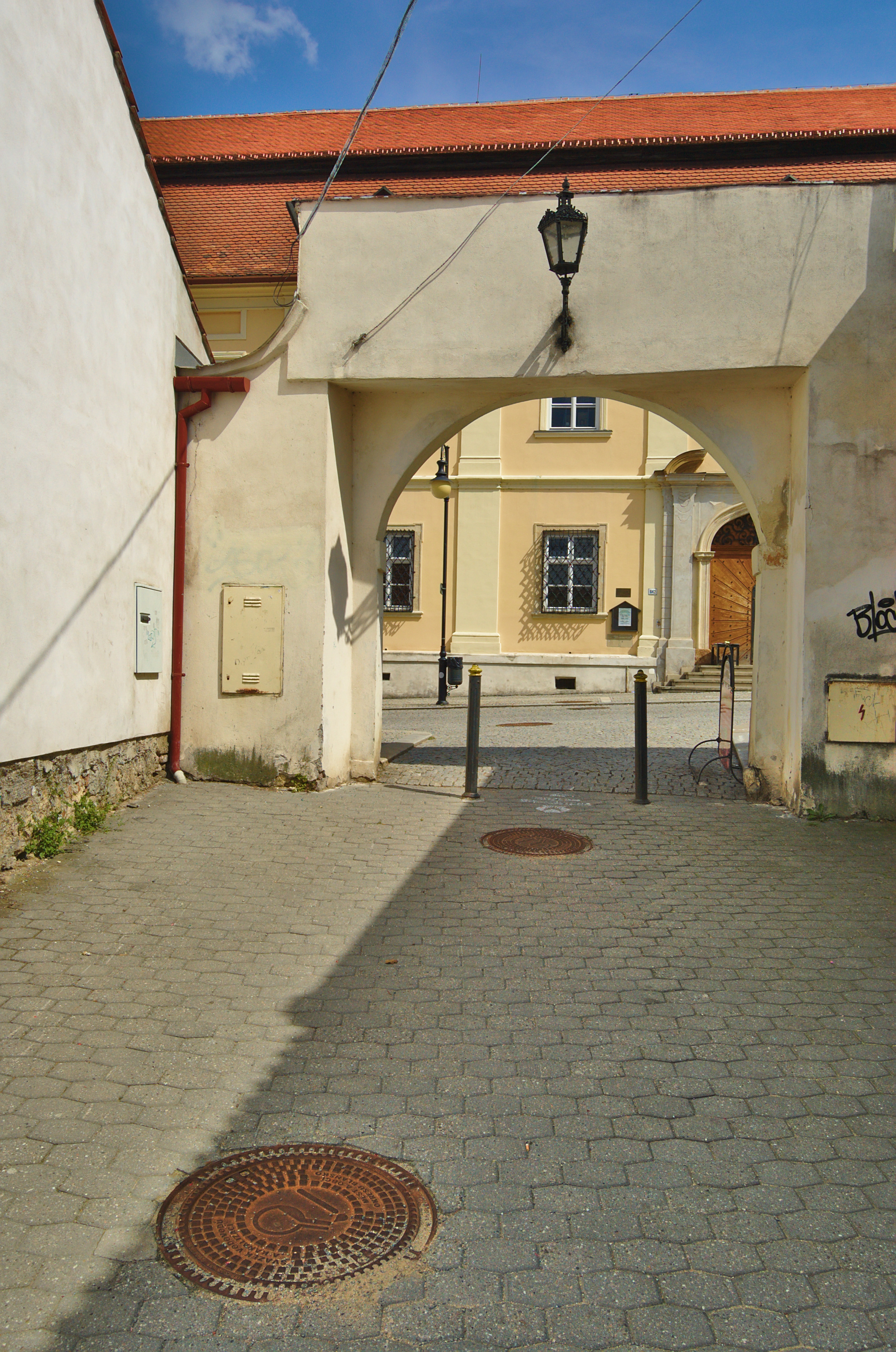 Brána do židovské čtvrti, Boskovice, okres Blansko